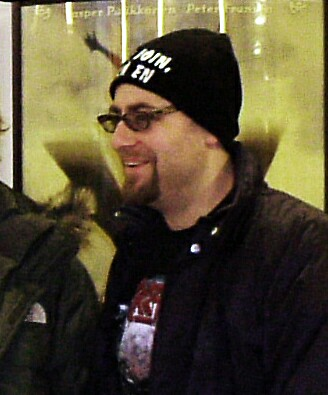 Ohjaaja Aleksi Mäkelä Matti-elokuvan promotilaisuudessa 2006